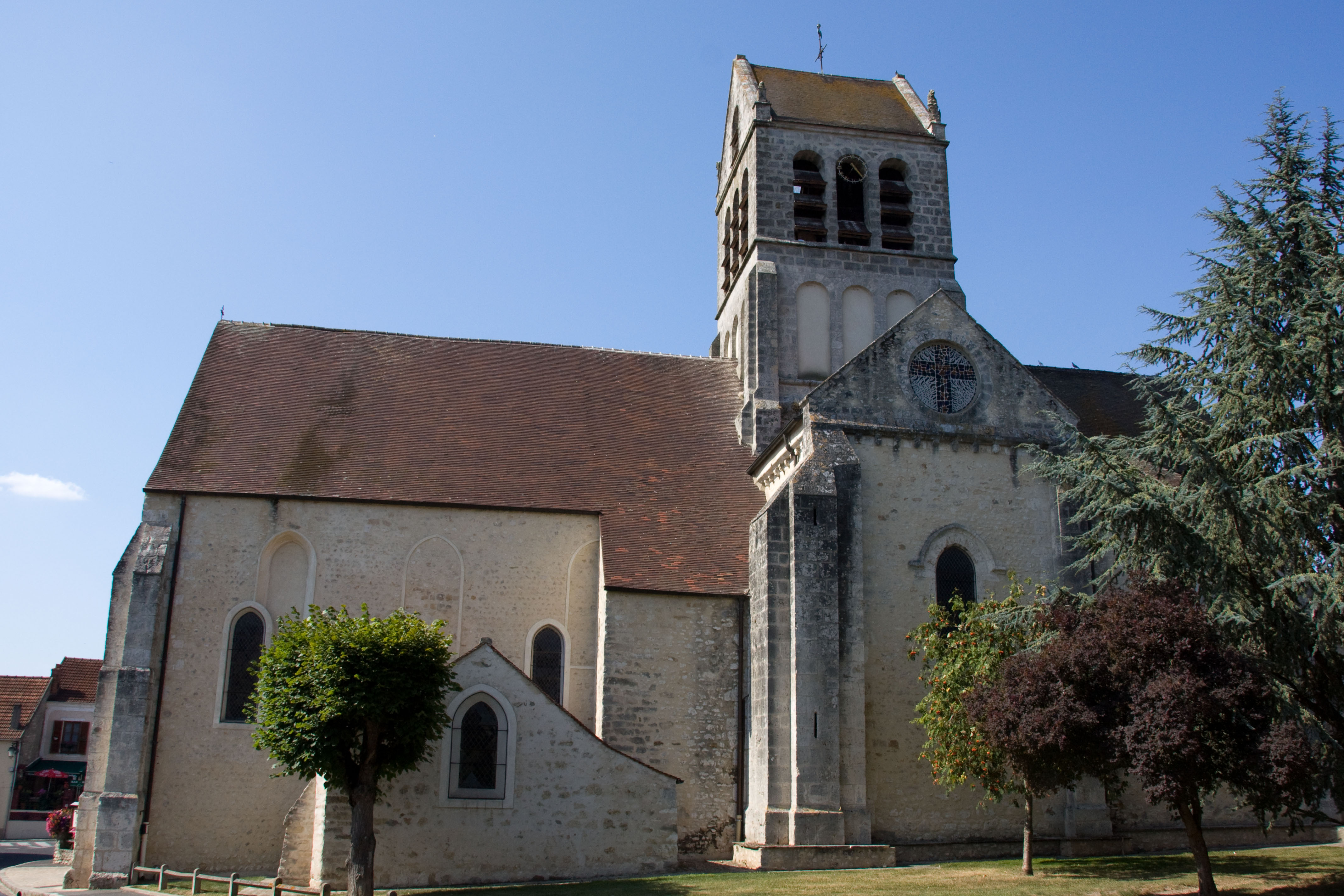 Eglise de Boutigny-sur-Essonne, Boutigny-sur-Essonne, Essonne, France